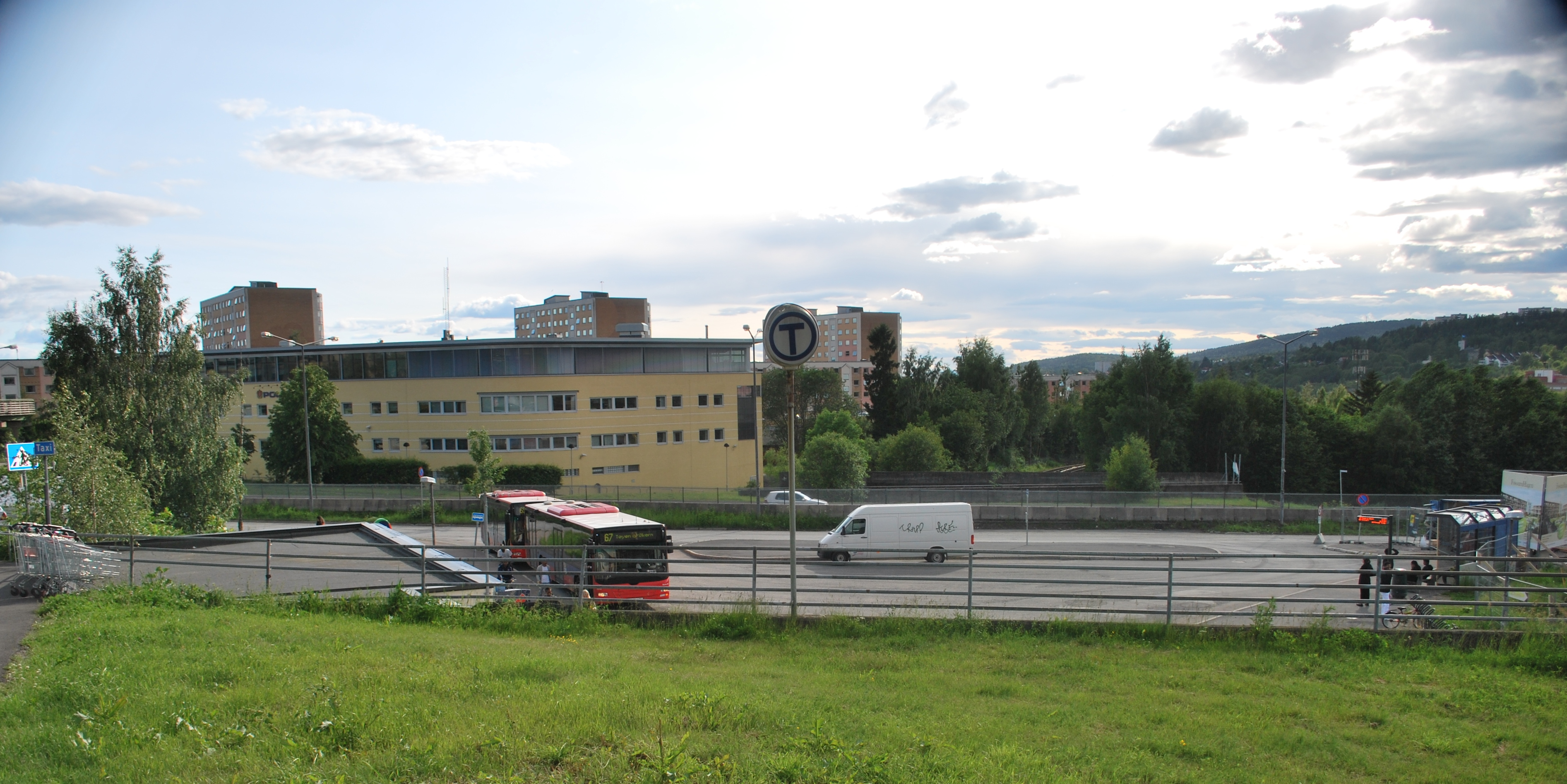 Området utenfor Stovner T-banestasjon og nordre inngang til Stovner senter, med Stovner politistasjon bak i bildet. Her ble Forssumparken (kalt Linjeparken i planleggingsperioden) åpnet i 2017